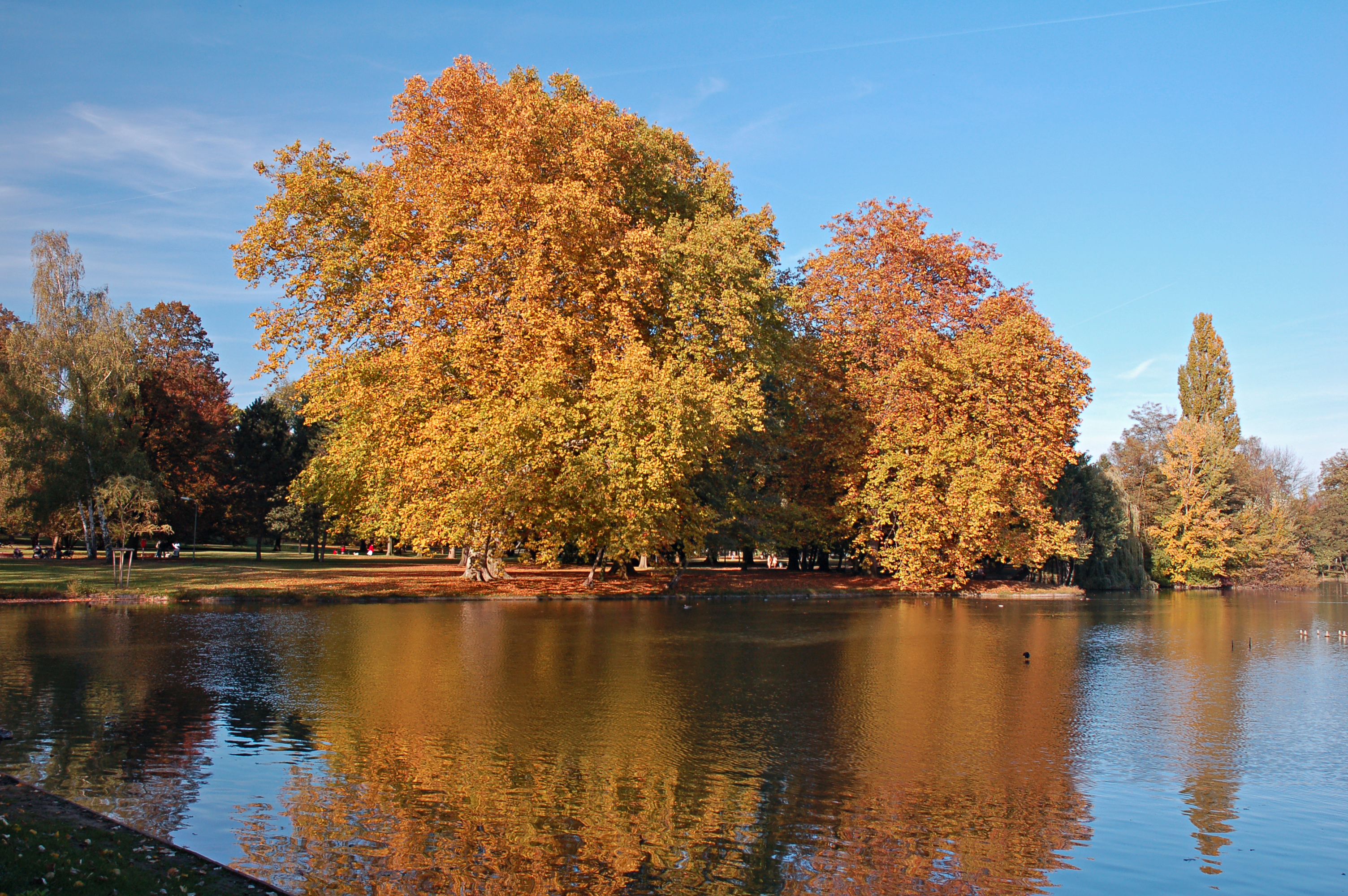 Ansichten aus dem Höchster Stadtpark